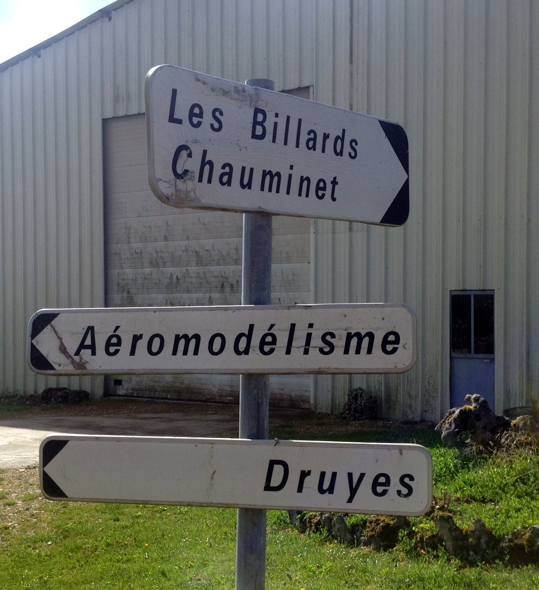 Panneaux à Pesselières : aéromodélisme etc.